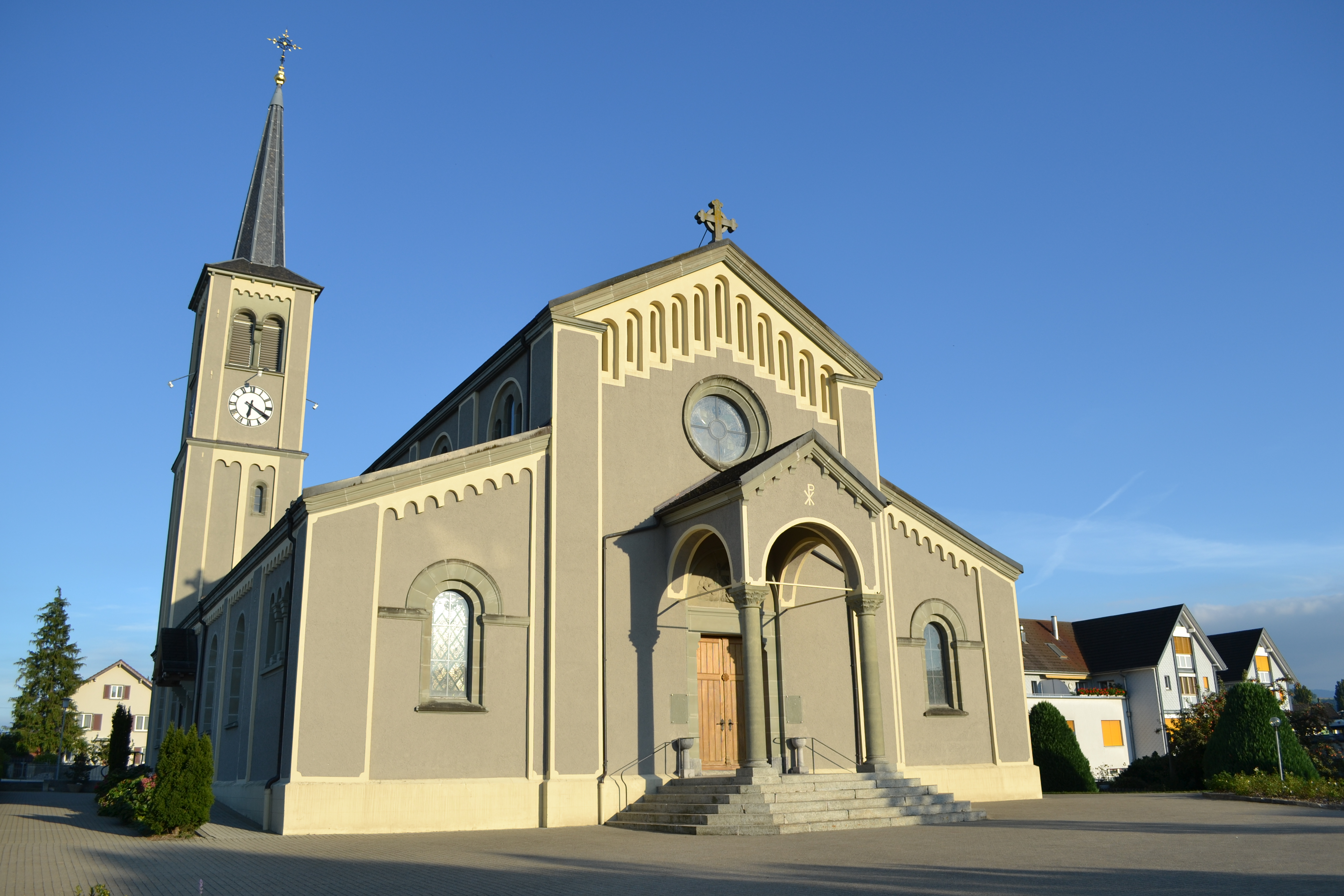 Sicht auf Pfarrkirche Schmitten (FR)